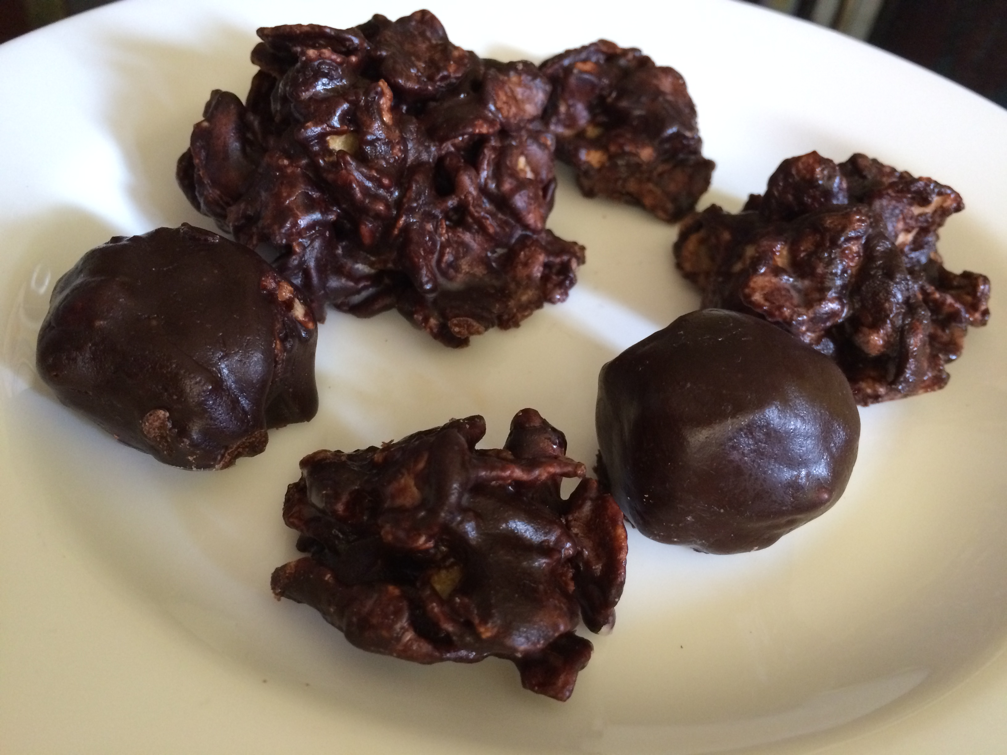 Enjambres de chocolate caseros